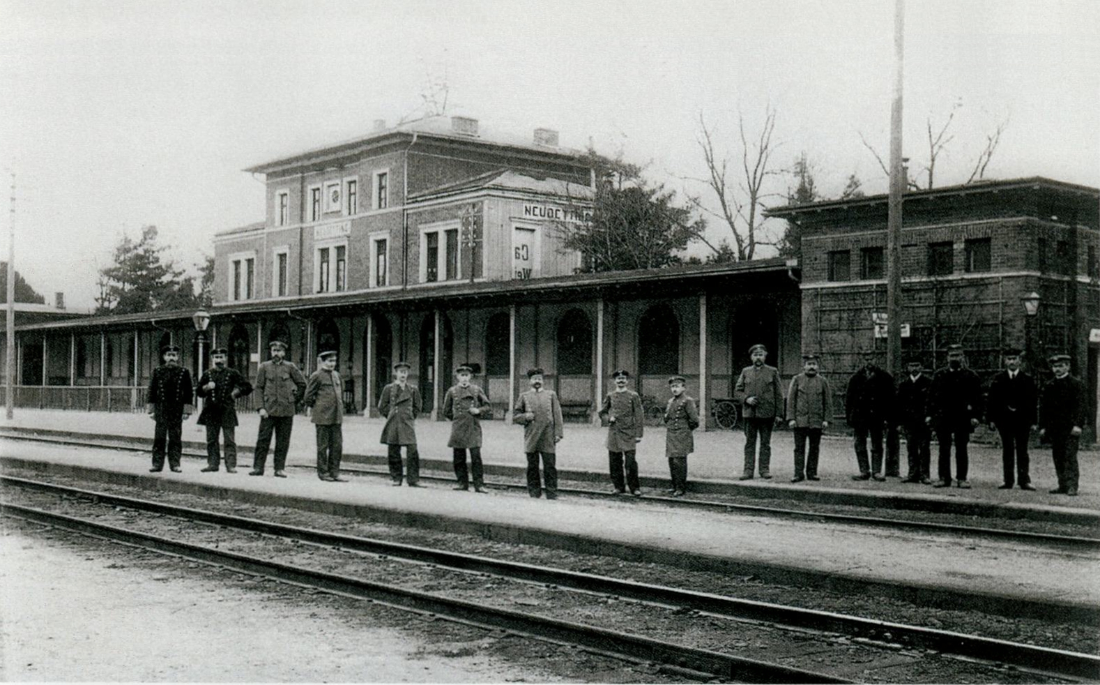 Empfangsgebäude des Bahnhofs Neuötting von der Gleisseite, davor das versammelte Bahnhofspersonal